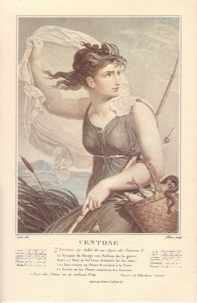 French Revolutionary Calendar VENTÔSE 20-21 février: Le Soleil est au signe des Poissons La Nymphe du Rivage aux Poissons fait la guerre Dans ce Mois où les Vents déchaînés par les eaux Les font rentrer au Fleuve & rendent à la Terre La Prairie où les Fleurs ramènent les Oiseaux